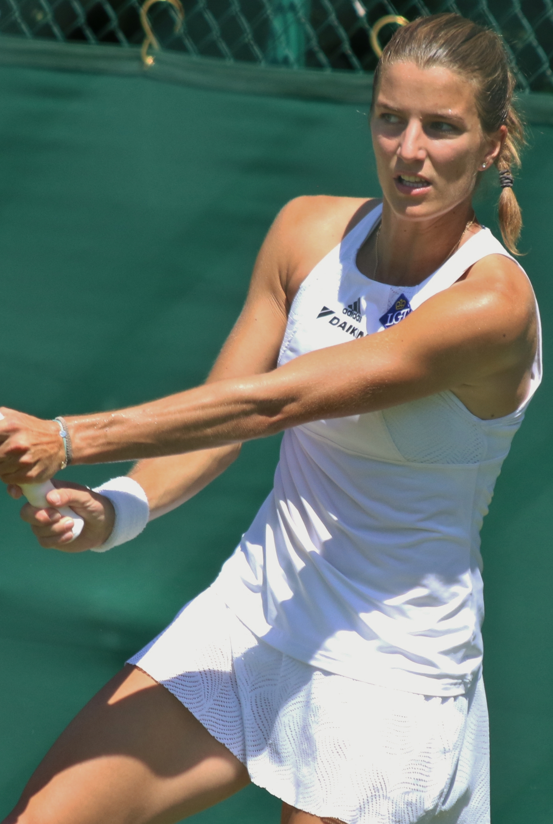 von Deichmann WMQ18 (3)